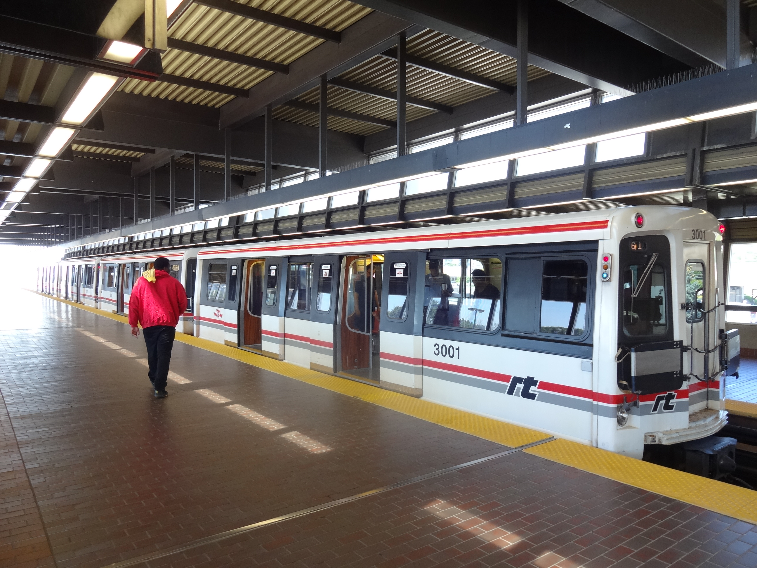 Train at Kennedy Station, in Toronto, Ontario, Canada.